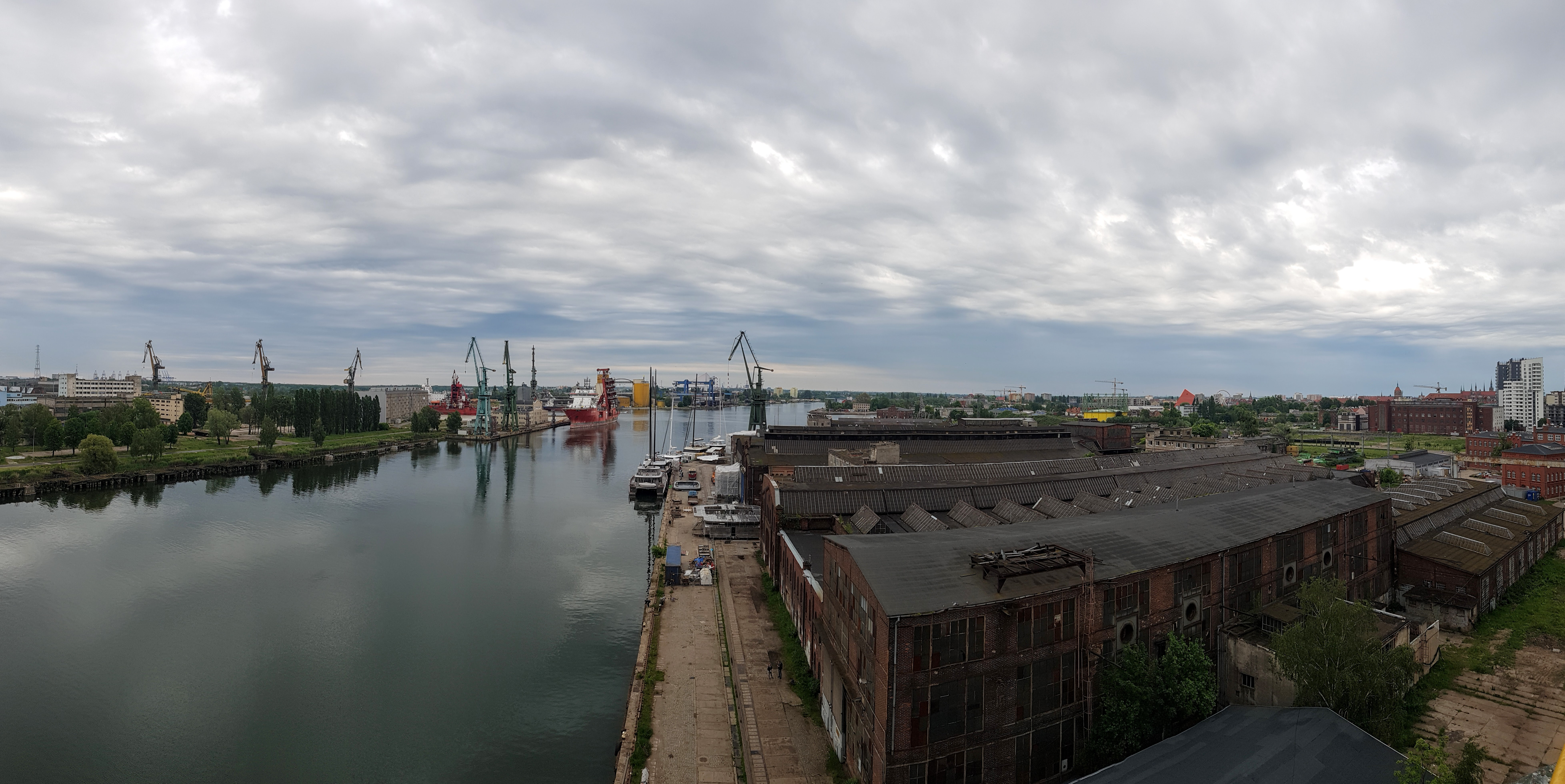 Stocznia Cesarska Gdańsk